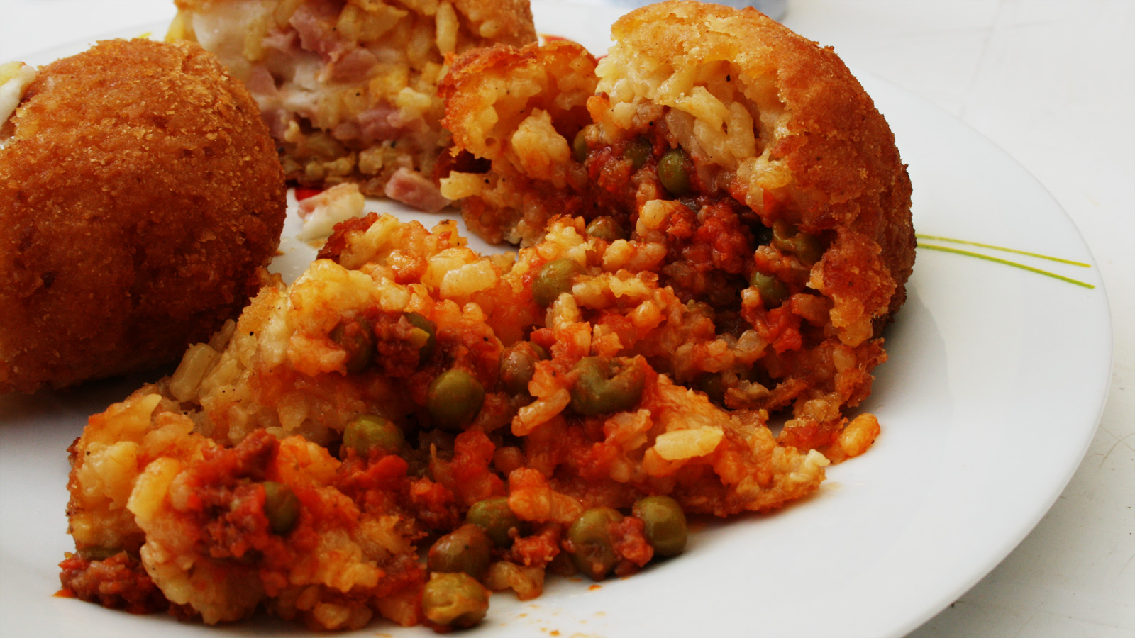 see title